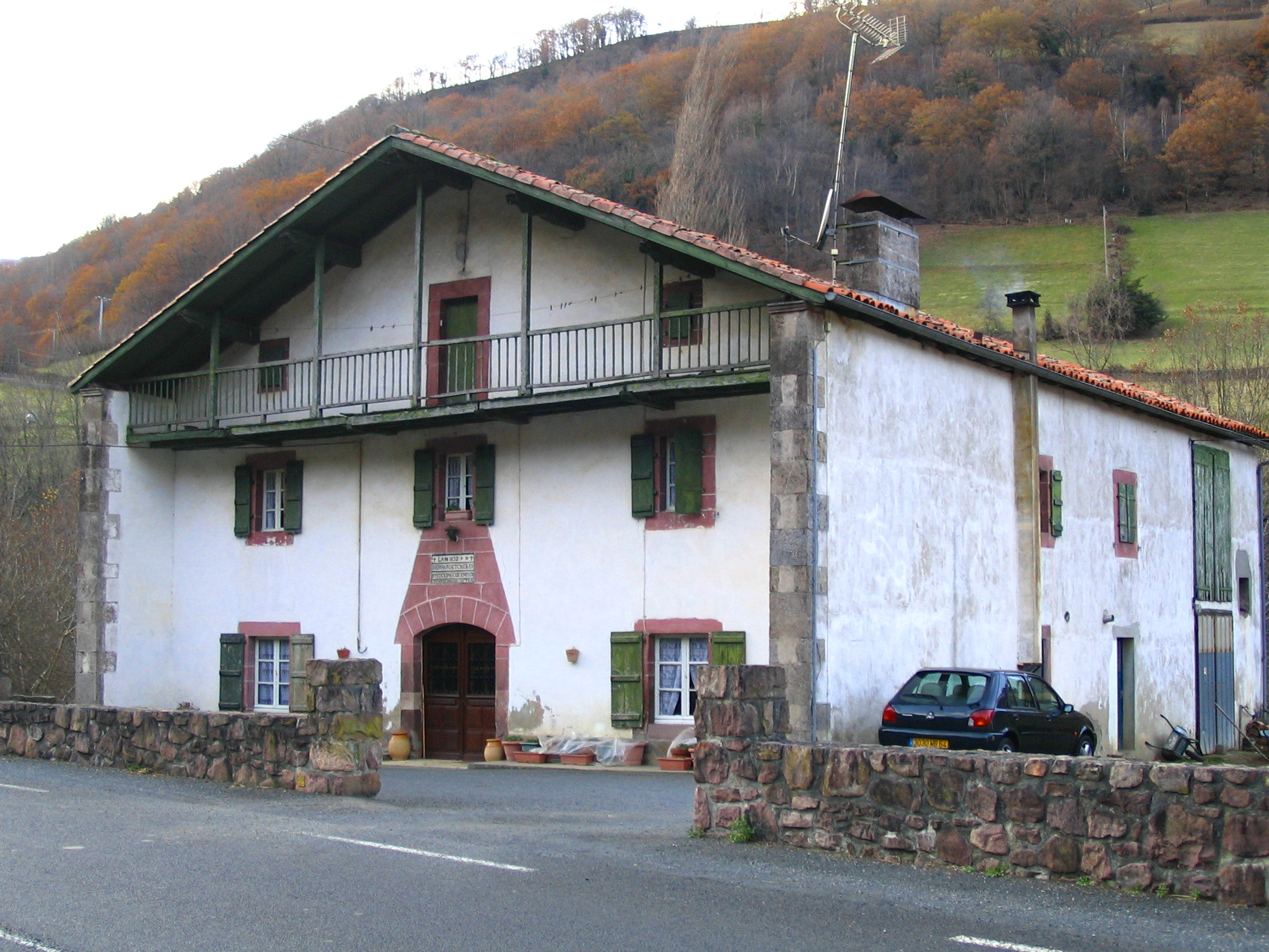 Vallée des Aldudes - Banca - Pyrénées Atlantiques - France Auteur/author: P.Charpiat - 2006